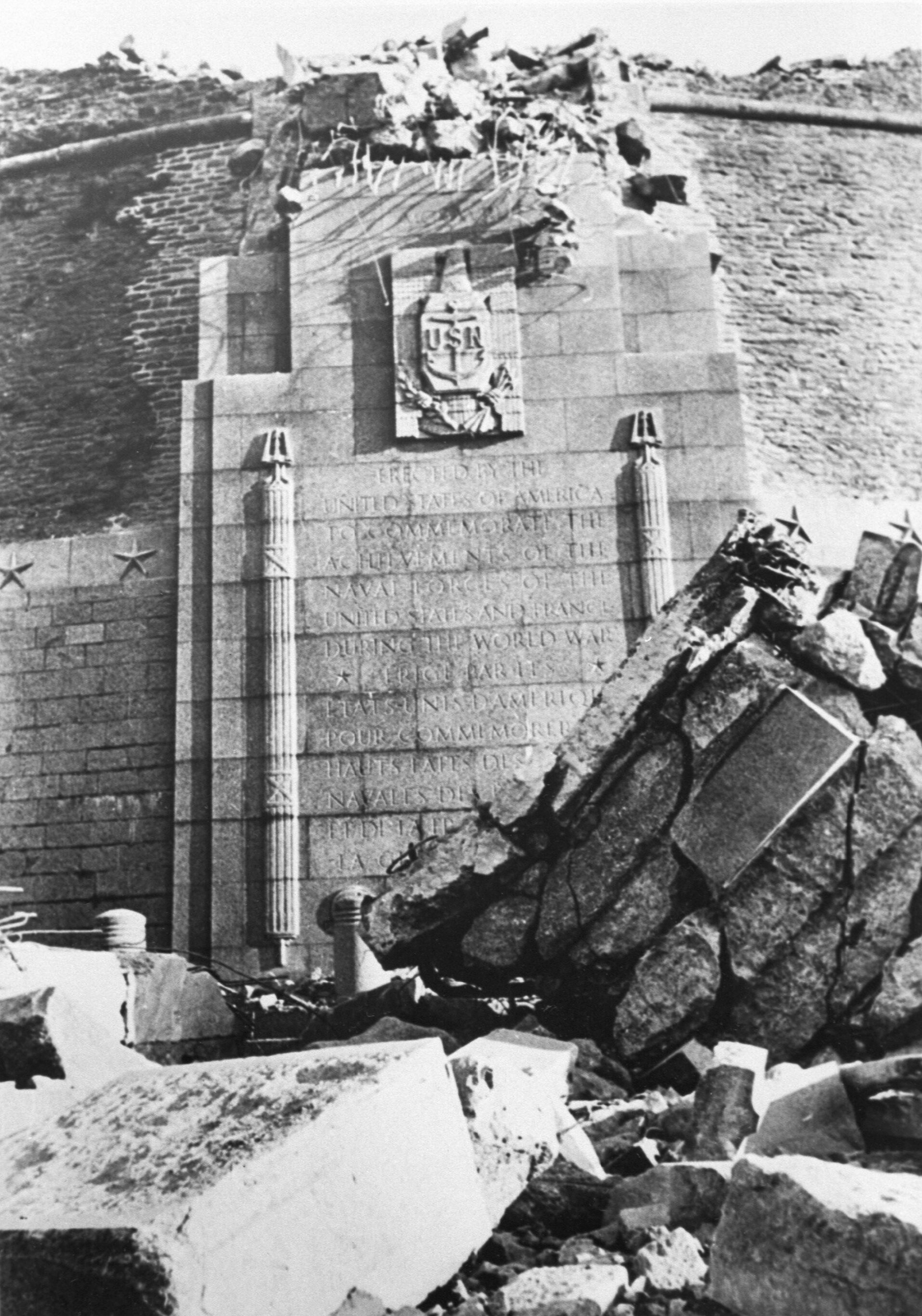 Destruction du monument aux morts américains